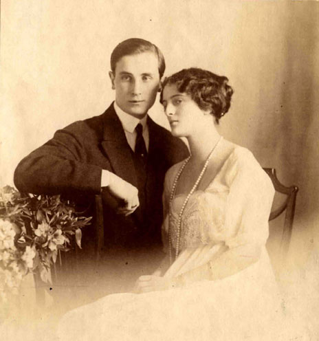 Князь Феликс Феликсович Юсупов с женой Ириной Александровной. [1914] Фотоателье "Boissonnas et Eggler" Внизу в левом нижнем углу оттиском: Boissonnas et Eggler. Фотография на паспарту. 12,3 11,5; паспарту 23,5 19